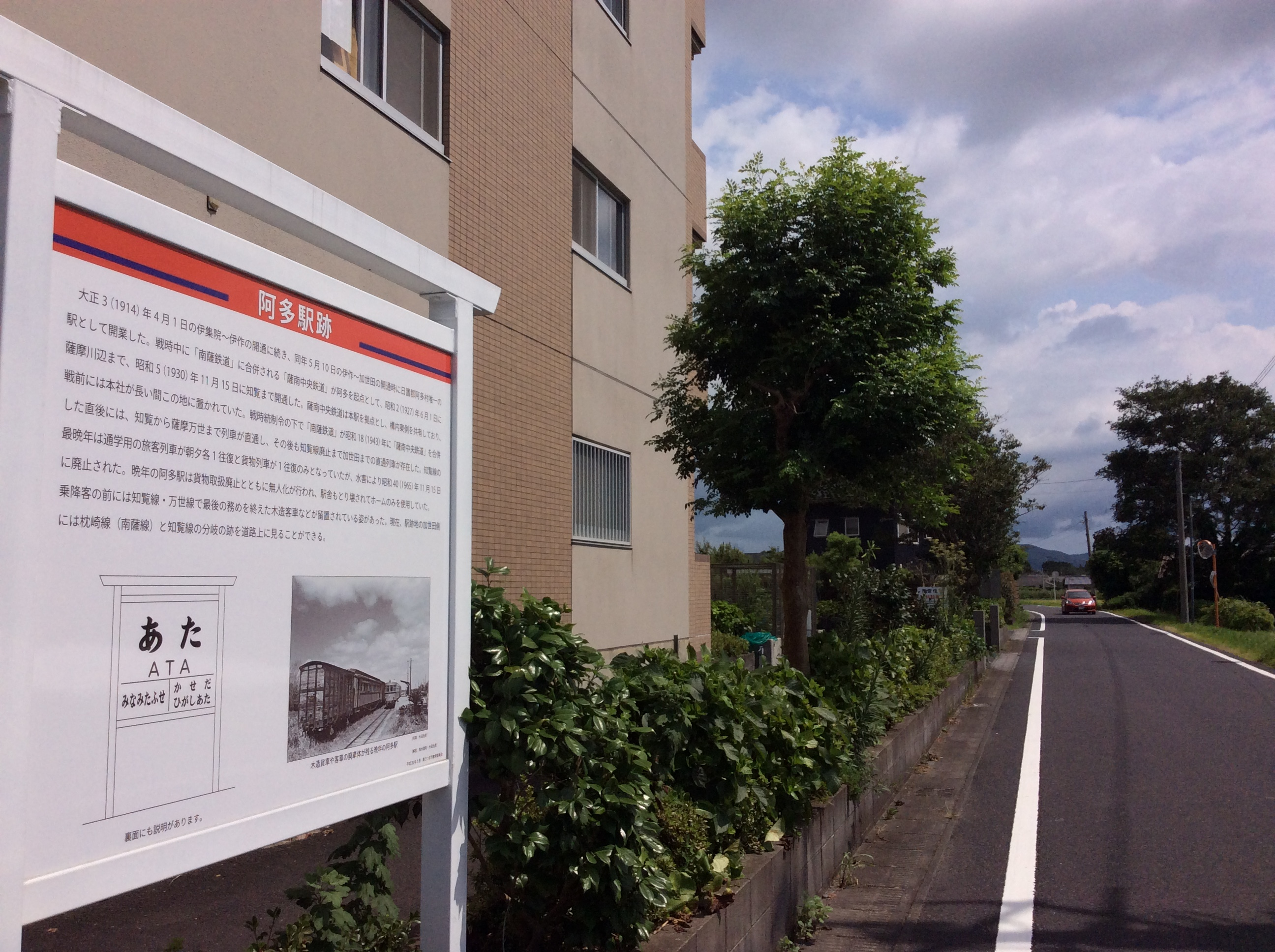 阿多駅跡を示す掲示板が阿多駅跡に立てられている（2016-07-28）